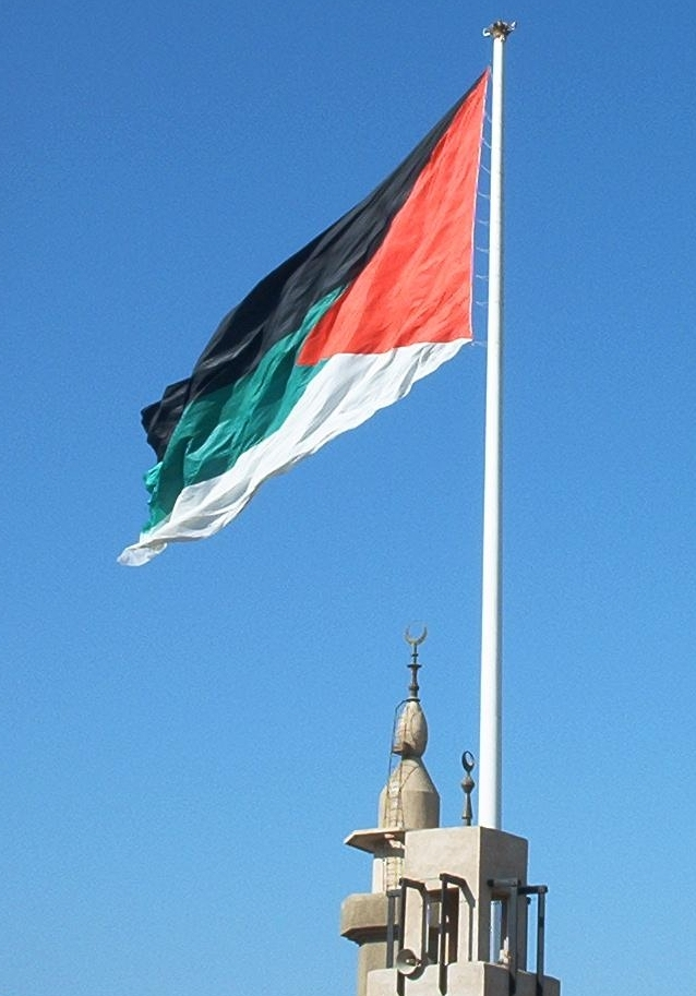 דגל המרד הערבי מתנוסס מעל עקבה